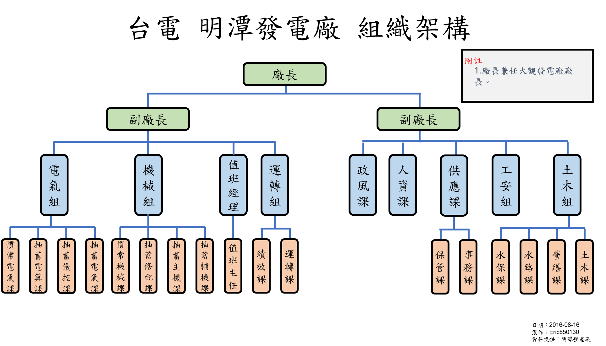 中文（台灣）: 台灣電力公司 明潭發電廠 組織架構